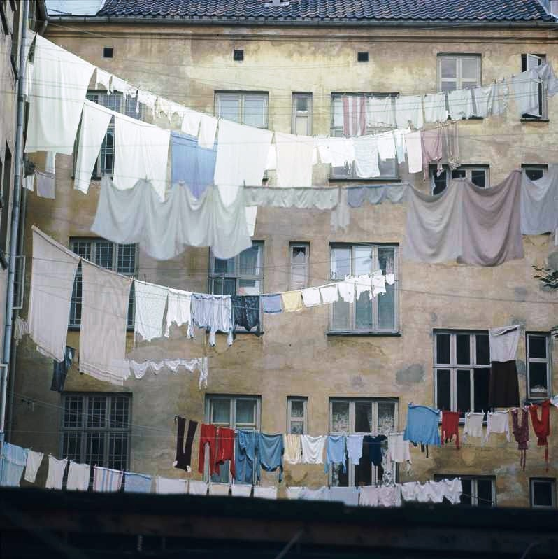 bygård, bakgård, tørkesnorer, klestørk.